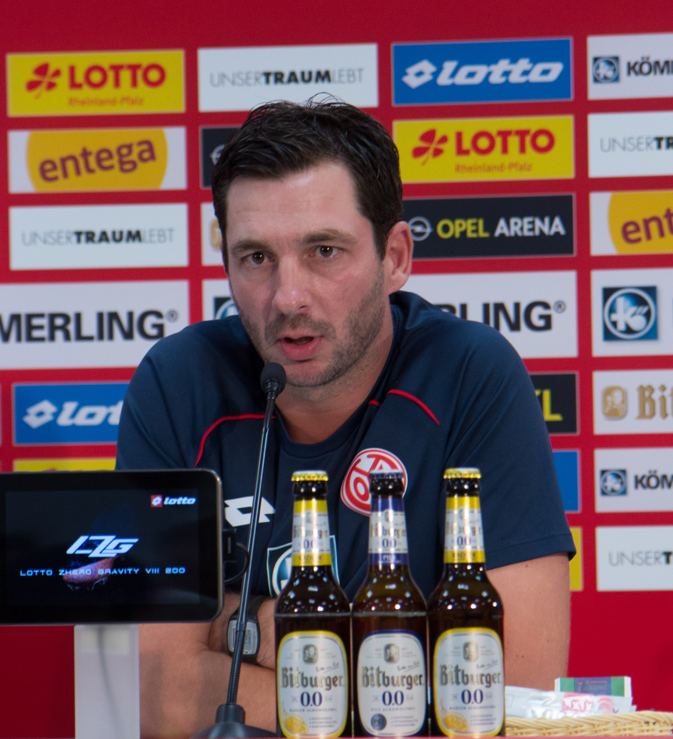 Pressekonferenz von Mainz 05 am 16. August 2018 mit Sandro Schwarz